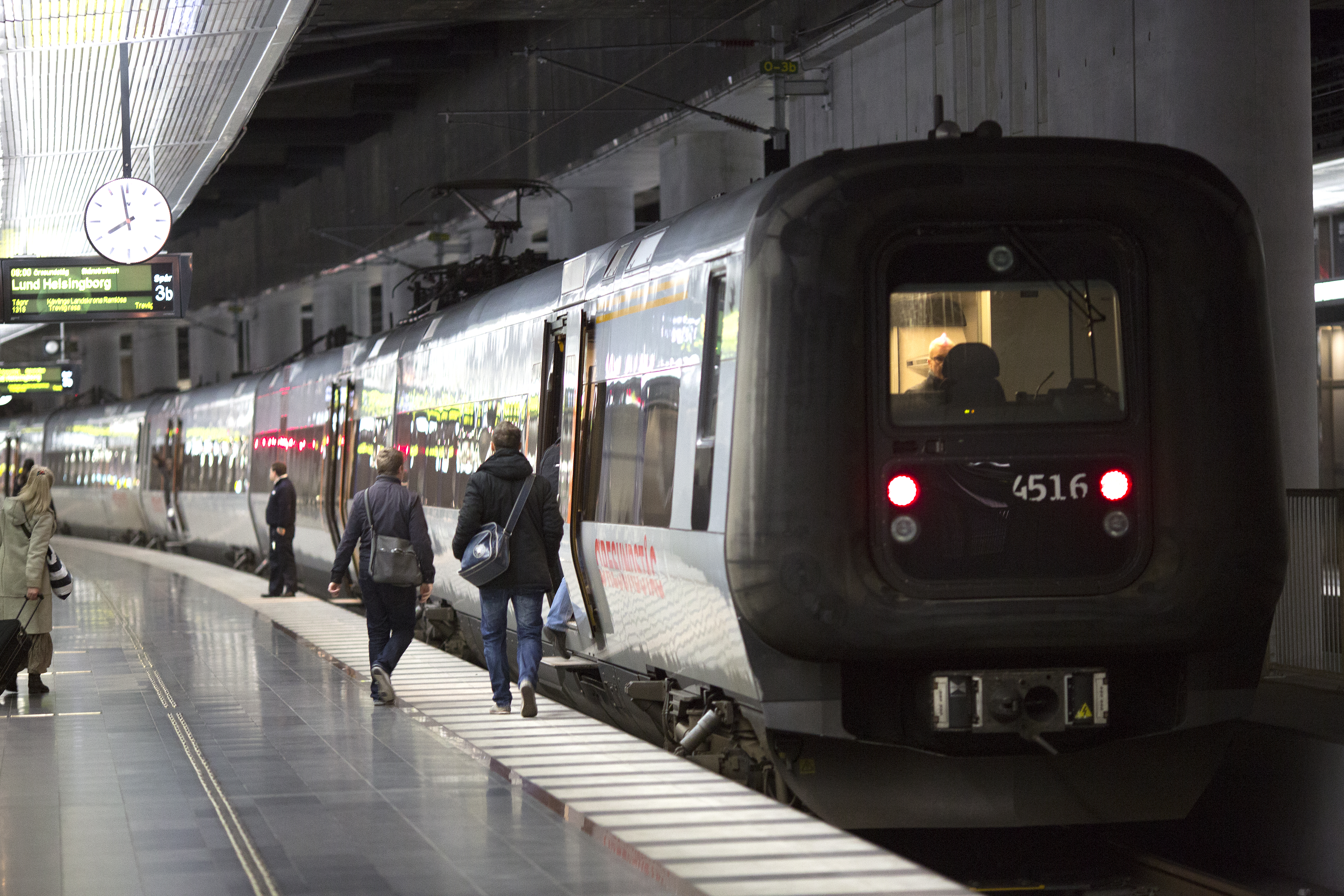 Øresundståg på Malmö C 2012-11-15 Foto: News Øresund – Johan Wessman. © News Øresund. Bilden får fritt publiceras under förutsättning att källa anges. (The picture can be used freely under the prerequisite that the source is given. ) Originalfil tillhandahålles gratis, kontakta: News Øresund, Malmö, Sweden. News Øresund är en oberoende regional nyhetsbyrå som ingår i projektet Øresund Media Platform som drivs av Øresundsinstituttet i partnerskap med Lunds universitet och Roskilde Universitet och med delfinansiering från EU (Interreg IV A Öresund) och 15 regionala, icke kommersiella aktörer.